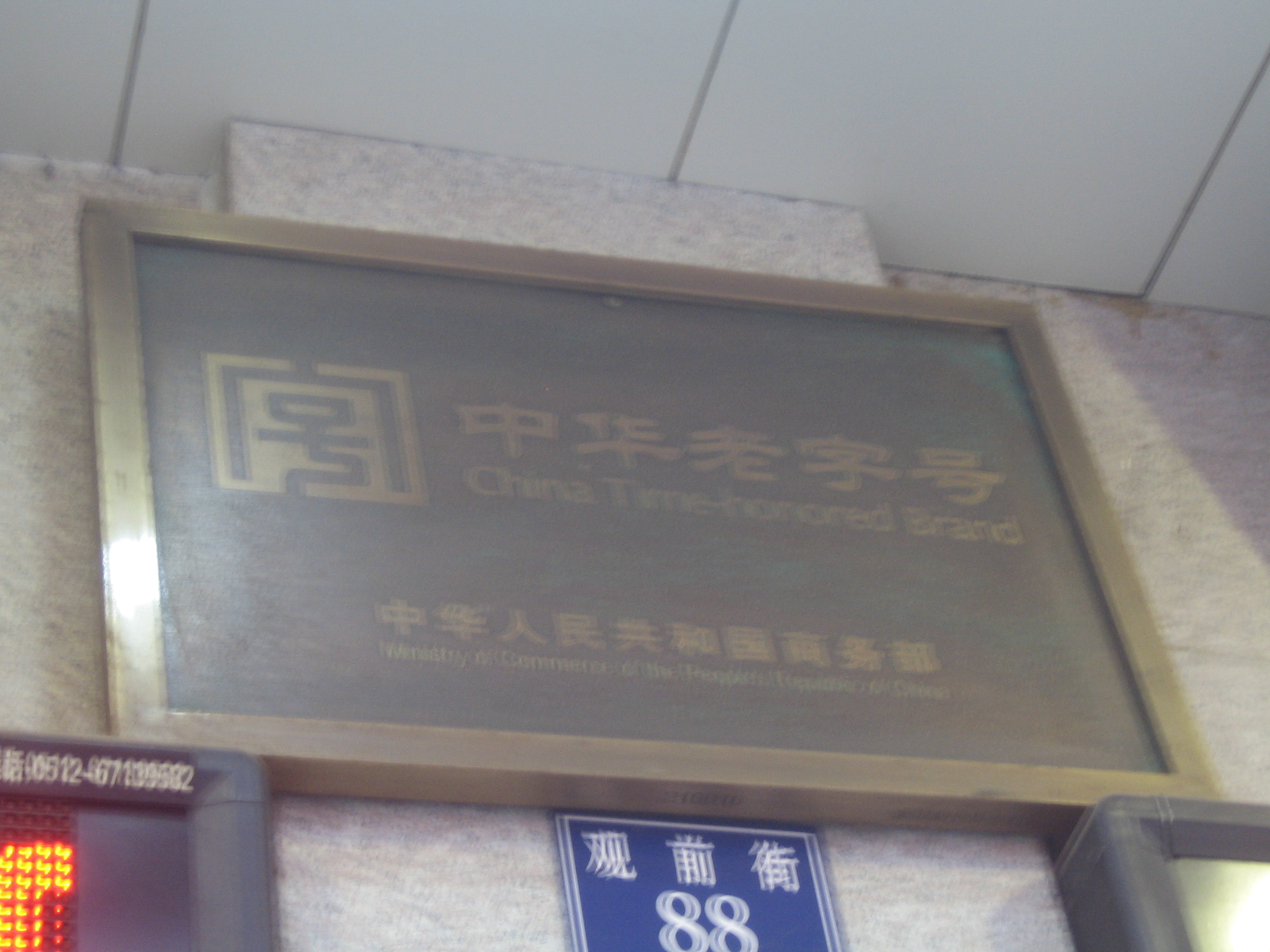 中华人民共和国商务部的中华老字号牌匾